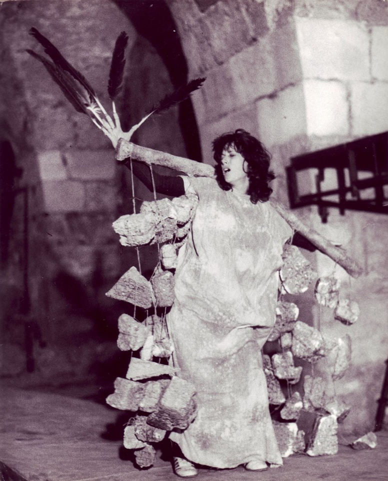 מלחמת היהודים, תיאטרון החאן, 1981